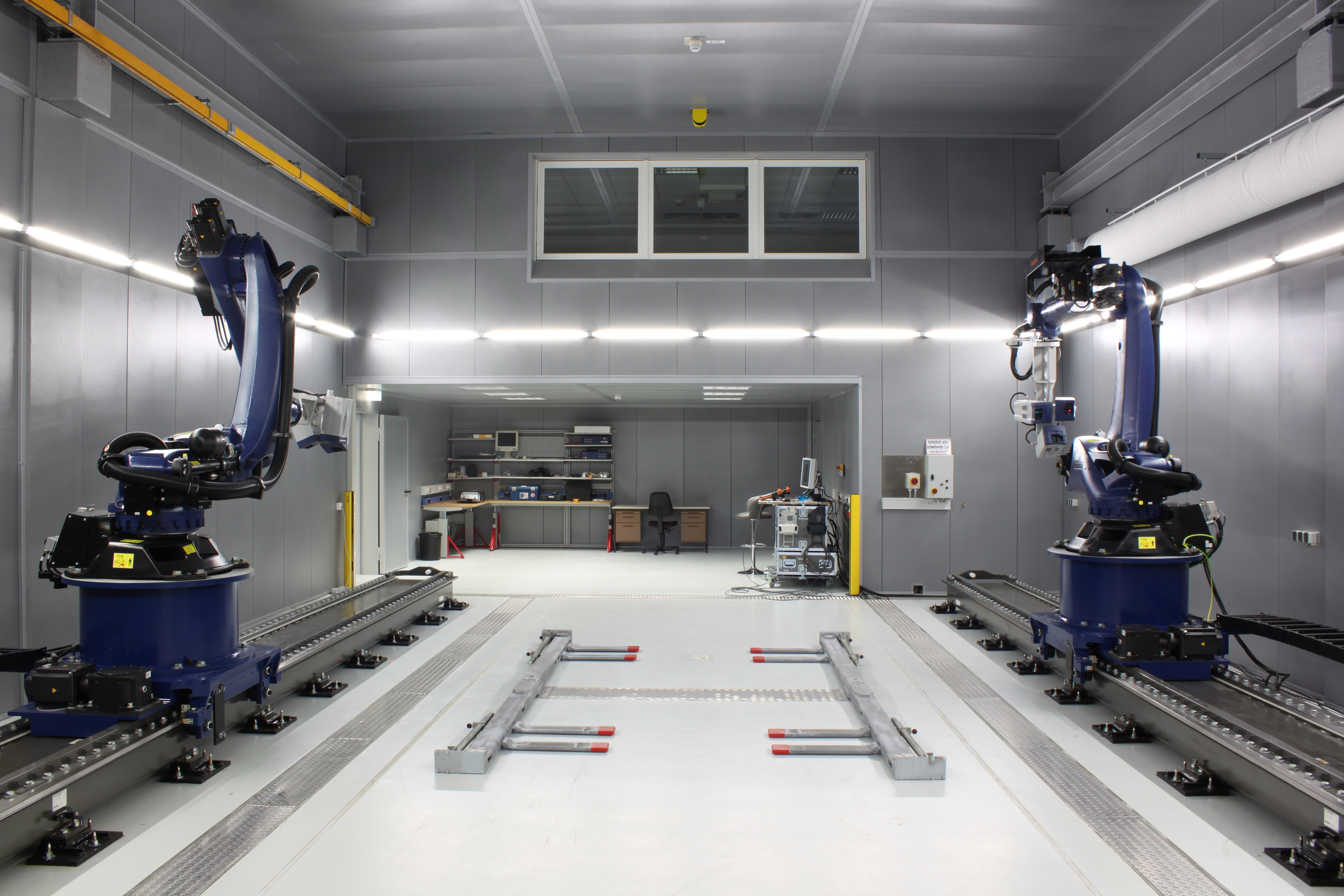 Automatisierte, robotergestützte Einrichtung zur Schwingungsanalyse mittels Laser-Scanning -Vibrometrie